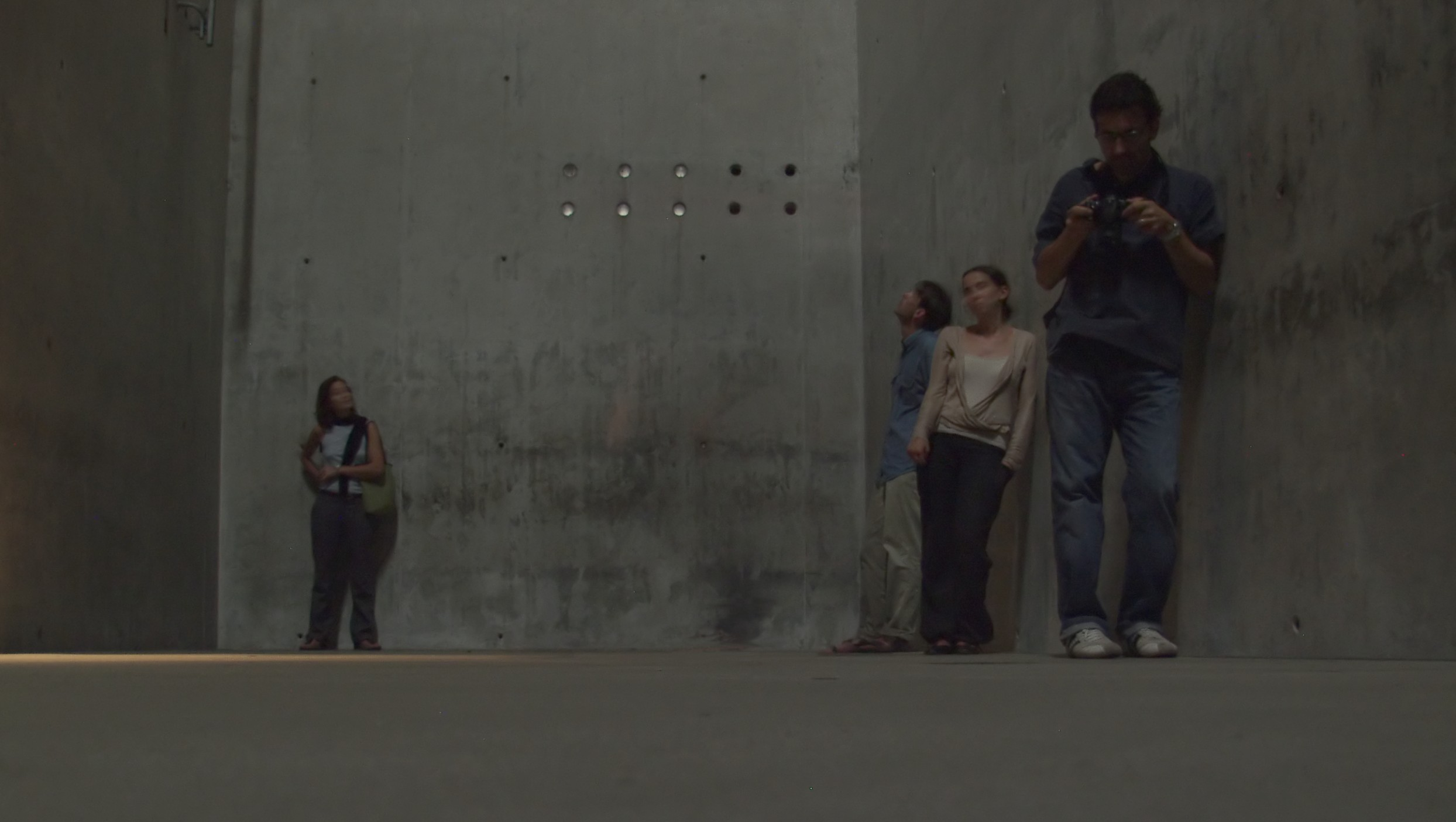 Jüdisches Museum Berlin, im Inneren des Holocaustturmes